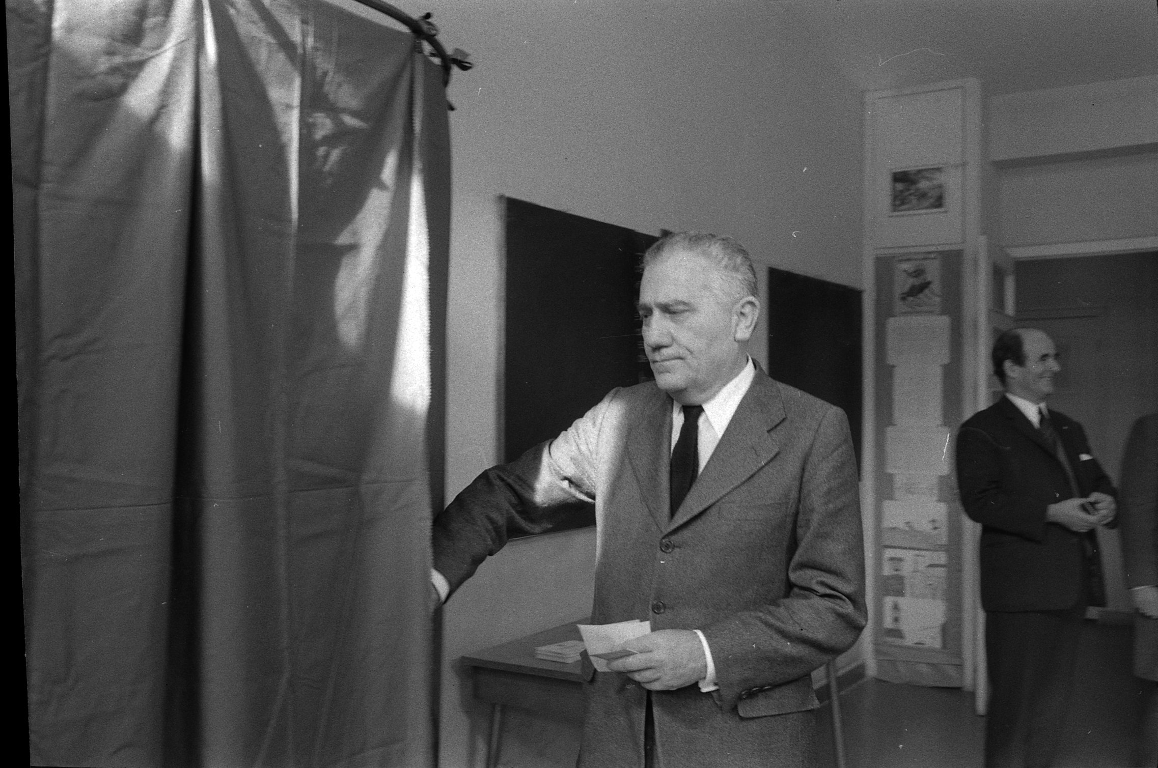 Bureau de vote. Le 4 Mars 1973. Vue de Monsieur Sanguinetti qui s'apprête à renter dans un isoloir pour choisir son vote.